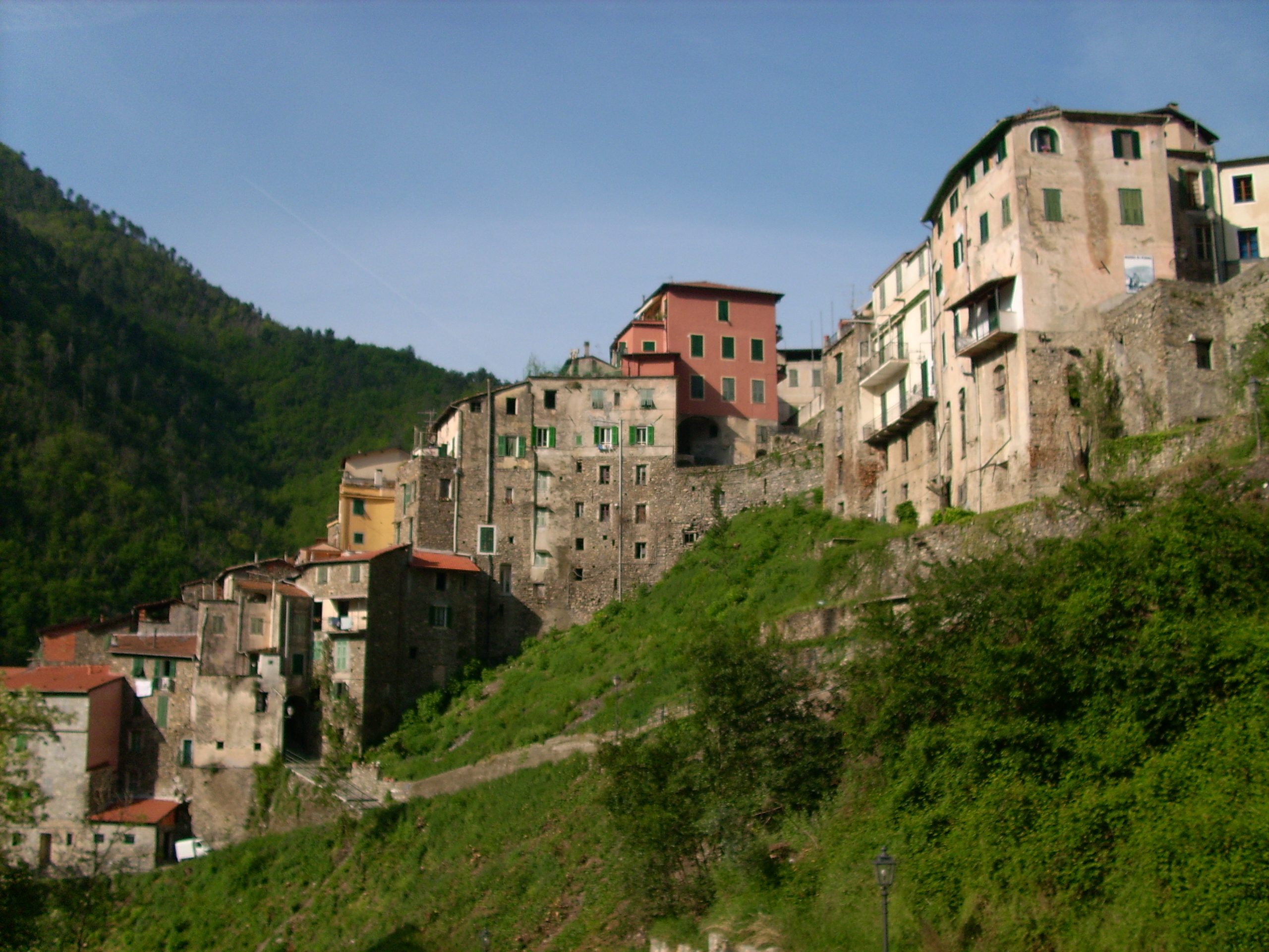 Pigna (IM), Liguria, Italia